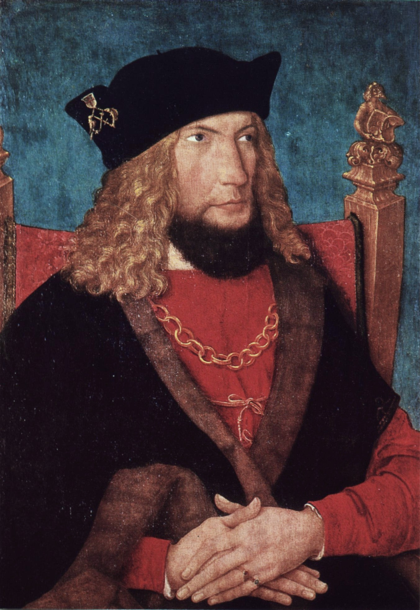 Ratgeber Maximilians I., oberster Feldzeugmeister (1500) und Mitglied der Regierung (1504)